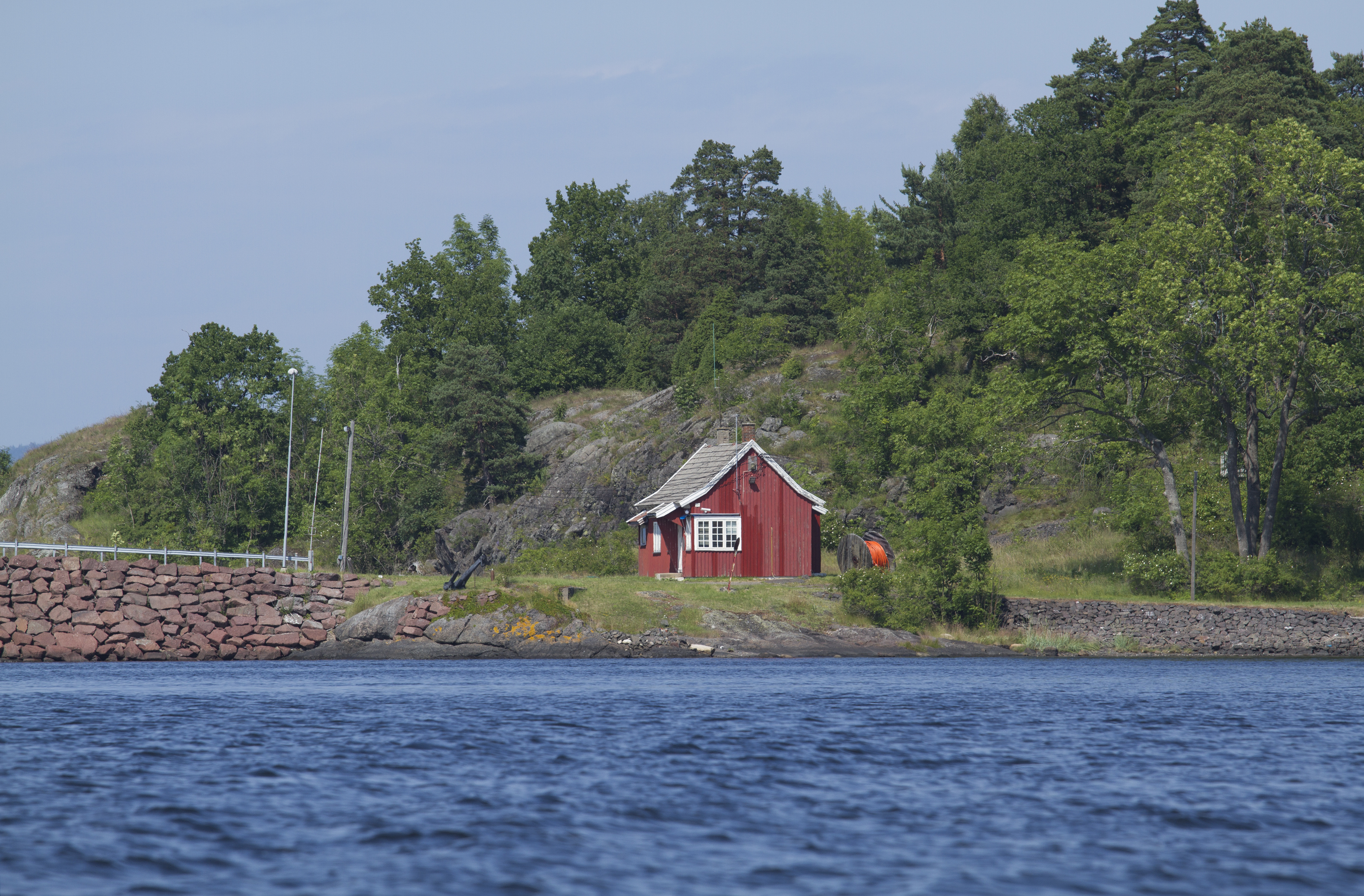 Mellomøya, Horten, Vestfold, Norway